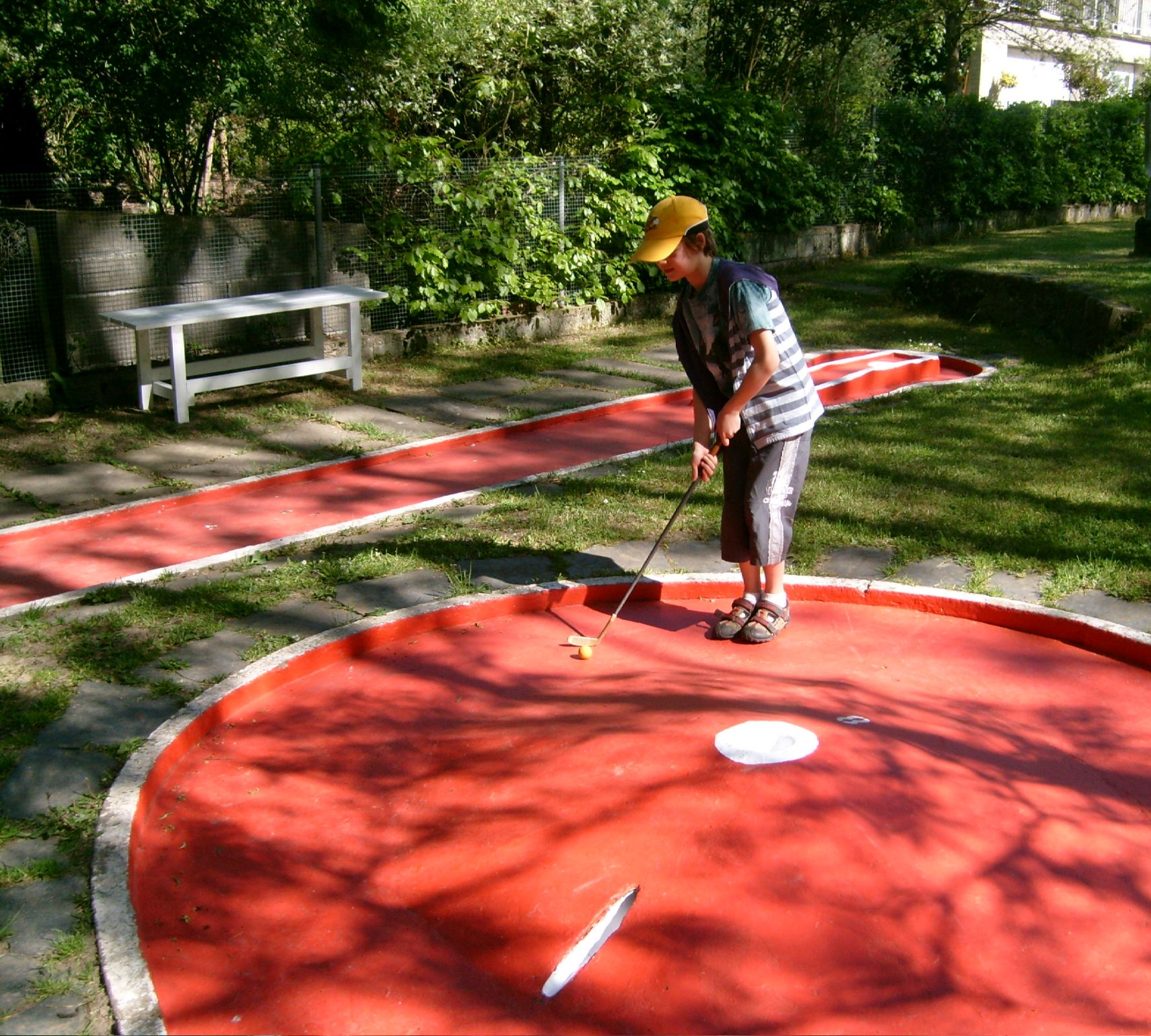 De Minigolf zu Veianen - 10. Mee 2008.